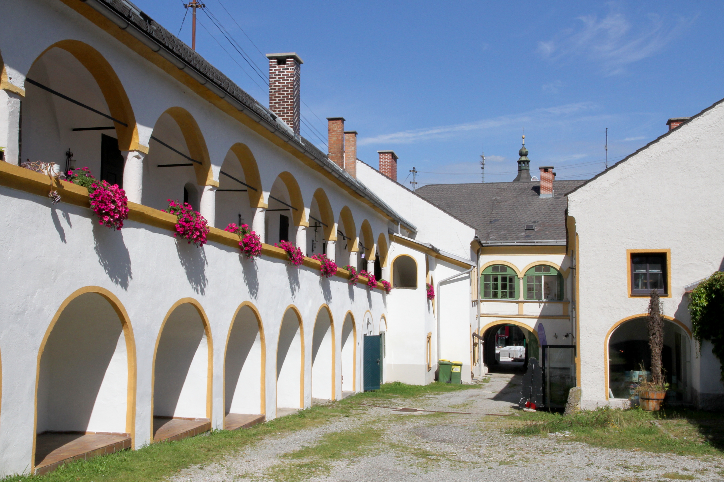 Das sogenannte Brahmshaus in Mürzzuschlag. In diesem Haus verbrachte Johannes Brahms die Sommermontate von 1884 und 1885 und komponierte darin die IV. Symphonie.